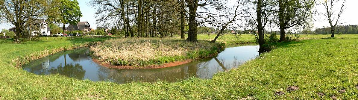 Flussschleife der Aller in Dannenbüttel an der B 188 zwischen Gifhorn und Wolfsburg (Bereich seit 2014 im Naturschutzgebiet „Allertal zwischen Gifhorn und Wolfsburg“)